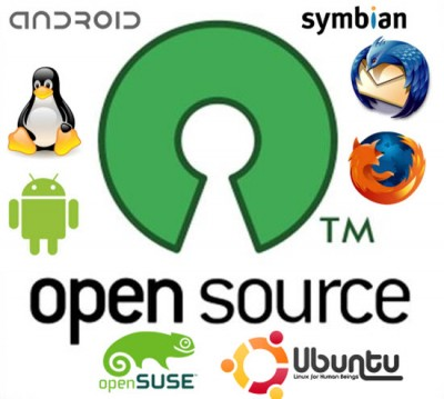 Лога на програми с отворен код